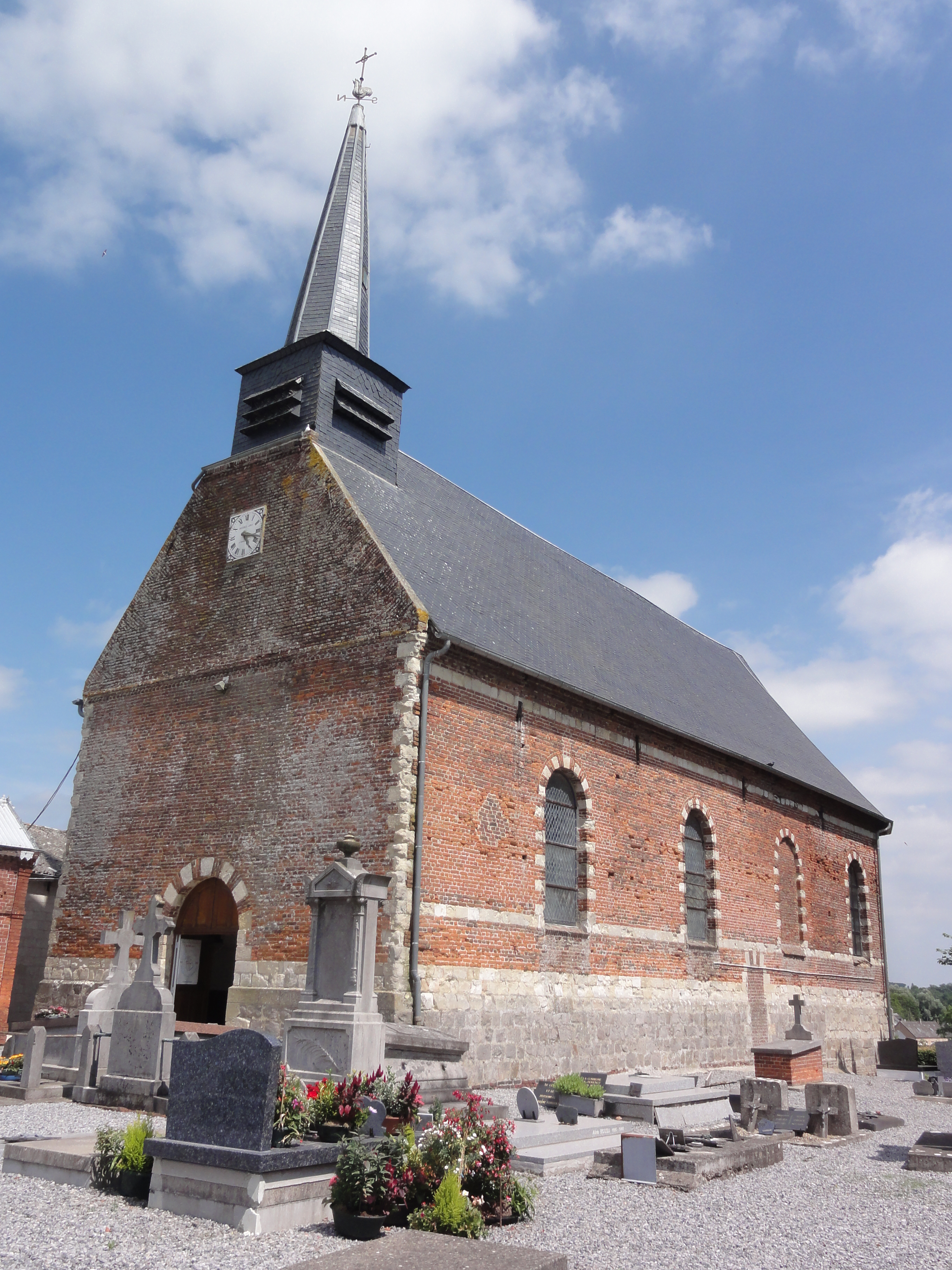 Dorengt (Aisne) Église Saints-Pierre-et-Paul